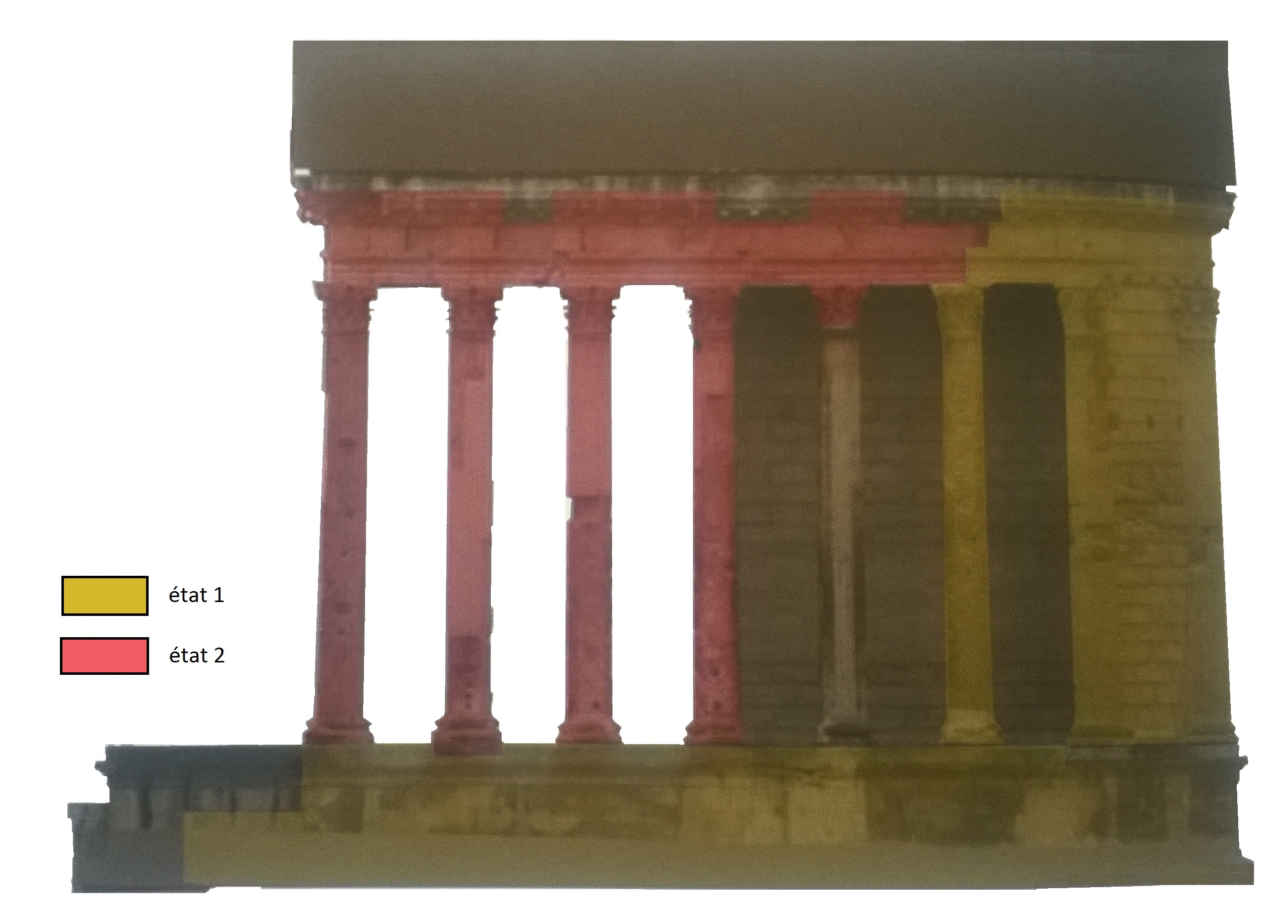 Schéma du temple révélant ses deux états de construction (époque romaine)